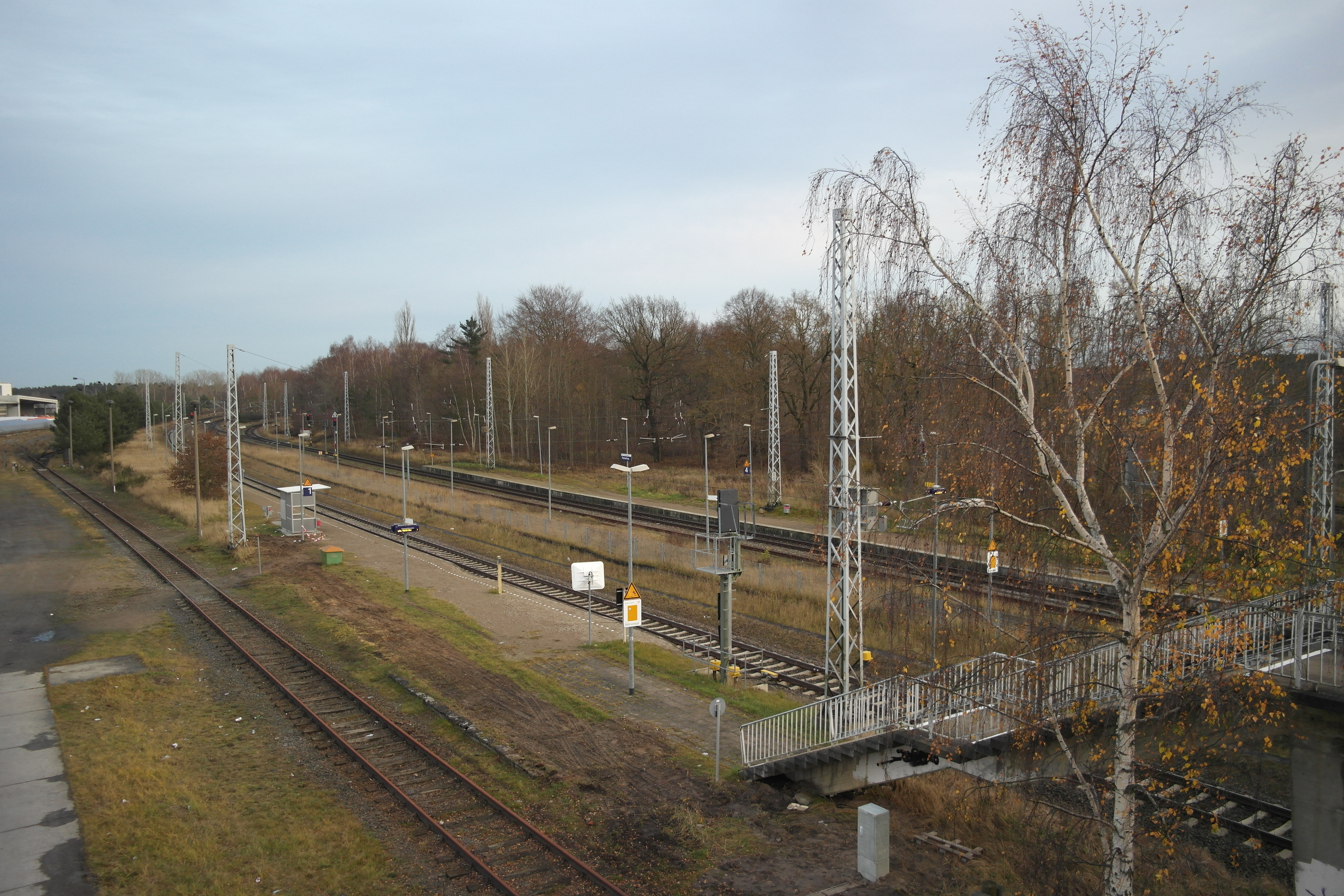 Bahnhof Priemerburg, Blick von der Brücke auf die Bahnsteige aus Richtung Nordwesten